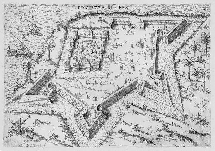 Carte du Borj El Kebir, Djerba 1599, Tunisie